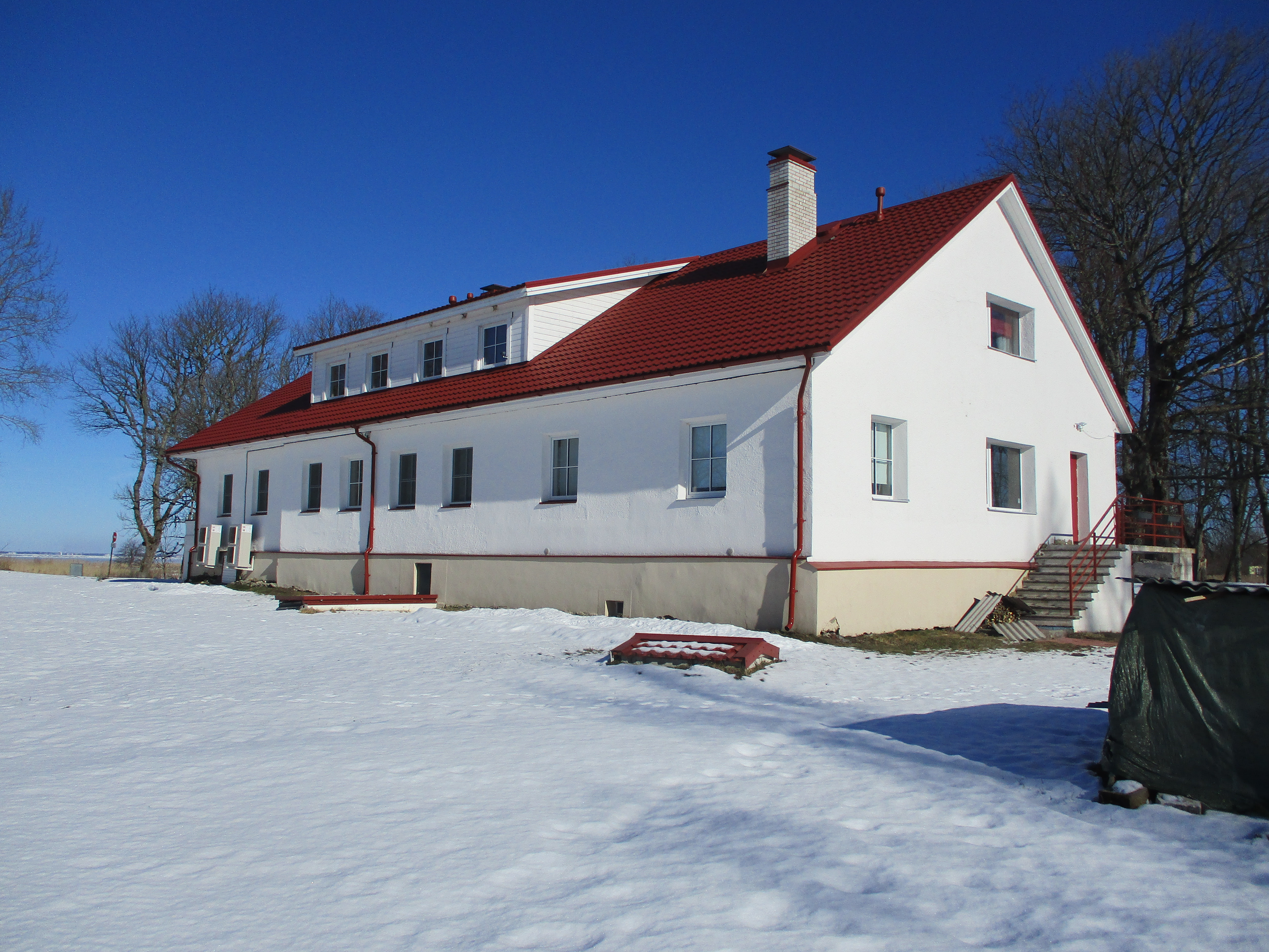 Peahoone edelaküljelt, kõrvalhoonete poolt.